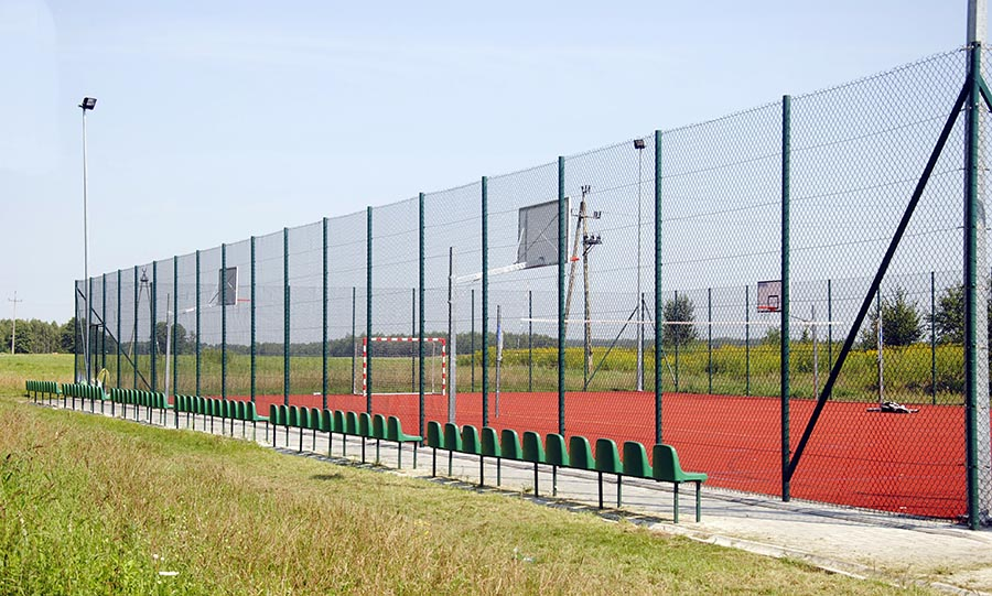 Boisko wielofunkcyjne w Cieplicach